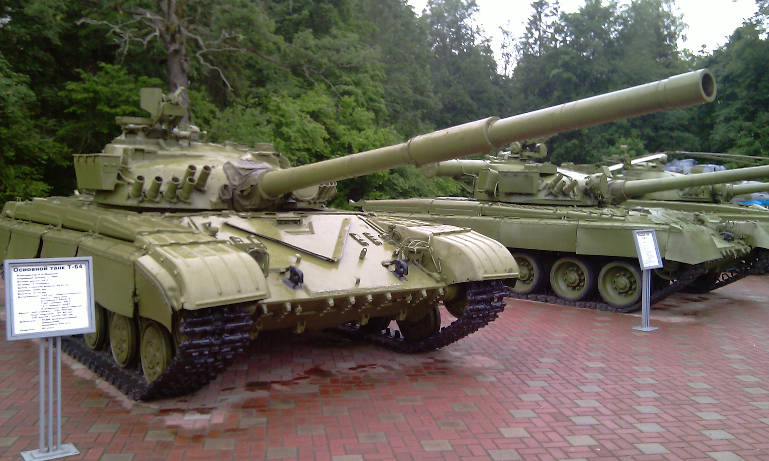 Мемориал - экспозиция военной техники. Бронетехника.